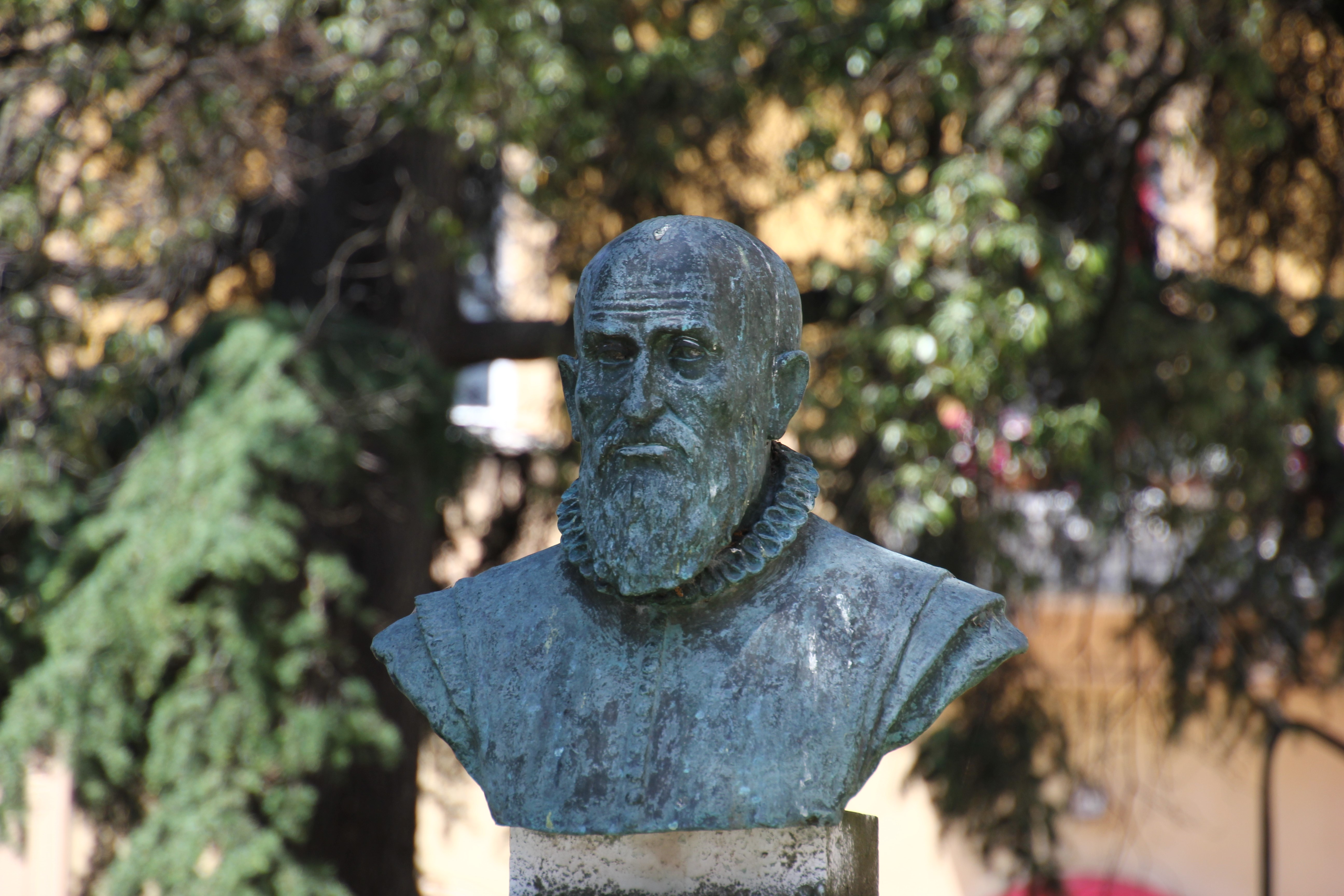 Perugia, busto di Galeazzo Alessi